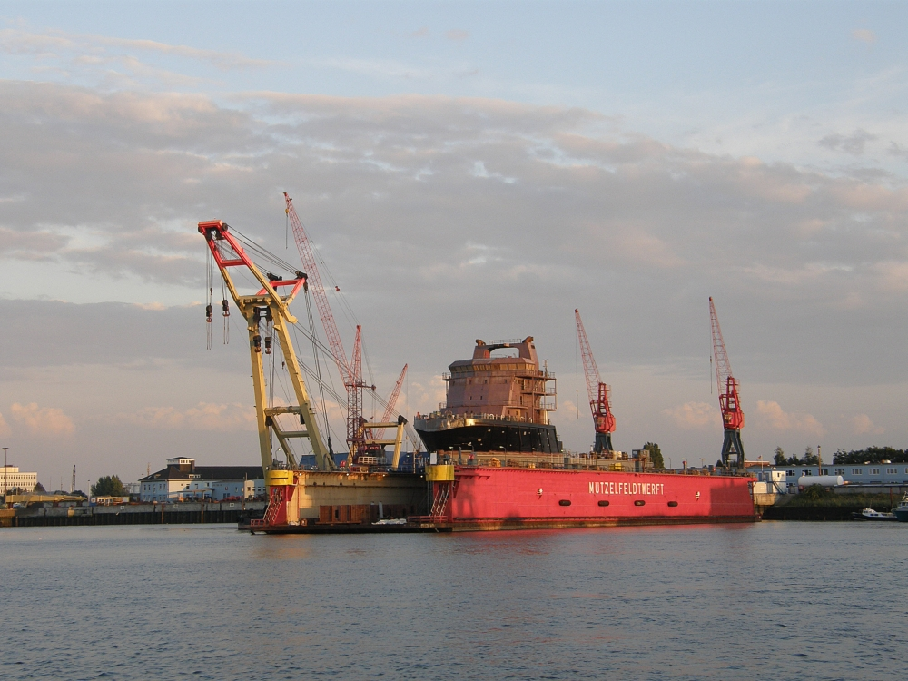 Auf der Mützelfeldtwerft wird ein neuer Schlepper gebaut